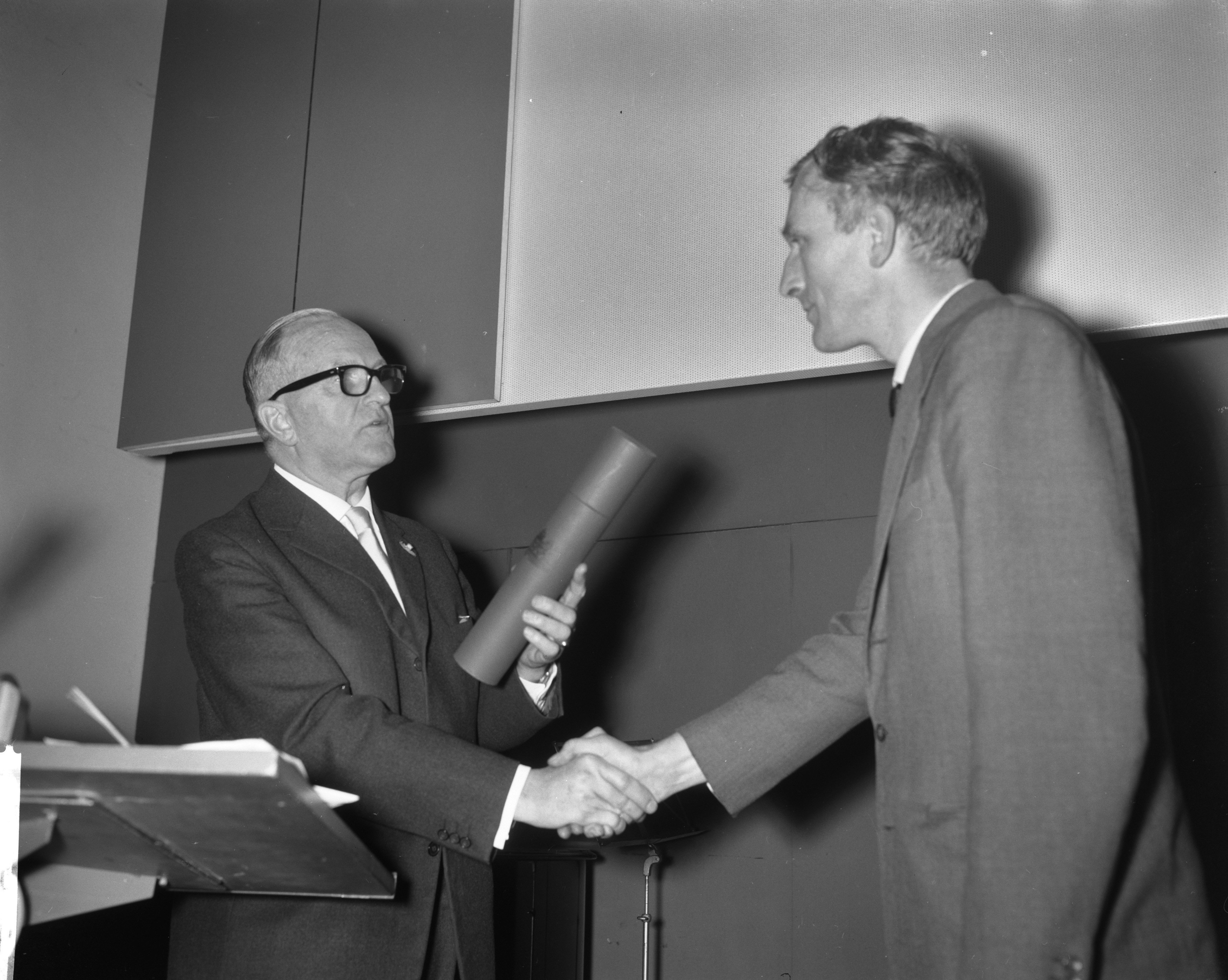 Collectie / Archief : Fotocollectie Anefo Reportage / Serie : [ onbekend ] Beschrijving : Uitreiking kunstprijzen in Stedelijk Museum . Paul Rodenko neemt prijs in ontvangst Datum : 17 november 1961 Trefwoorden : Musea, Ontvangsten, Uitreikingen, kunstprijzen, prijzen Persoonsnaam : Rodenko Fotograaf : Bilsen, Joop van / Anefo Auteursrechthebbende : Nationaal Archief Materiaalsoort : Negatief (zwart/wit) Nummer archiefinventaris : bekijk toegang 2.24.01.04 Bestanddeelnummer : 913-1940 Reacties Geplaatst door Amsterdammertje op 06 oktober 2015 - 19:16. Wethouder van Kunstzaken mr. A. de Roos overhandigd de poëzieprijs 1960 aan dichter Paul Rodenko. Plaats: Amsterdam, Noord-Holland Persoonsnamen: Rodenko, Paul; Roos, de, Albertus NB. Er werden drie poëzieprijzen 1960 uitgereikt in dat jaar.